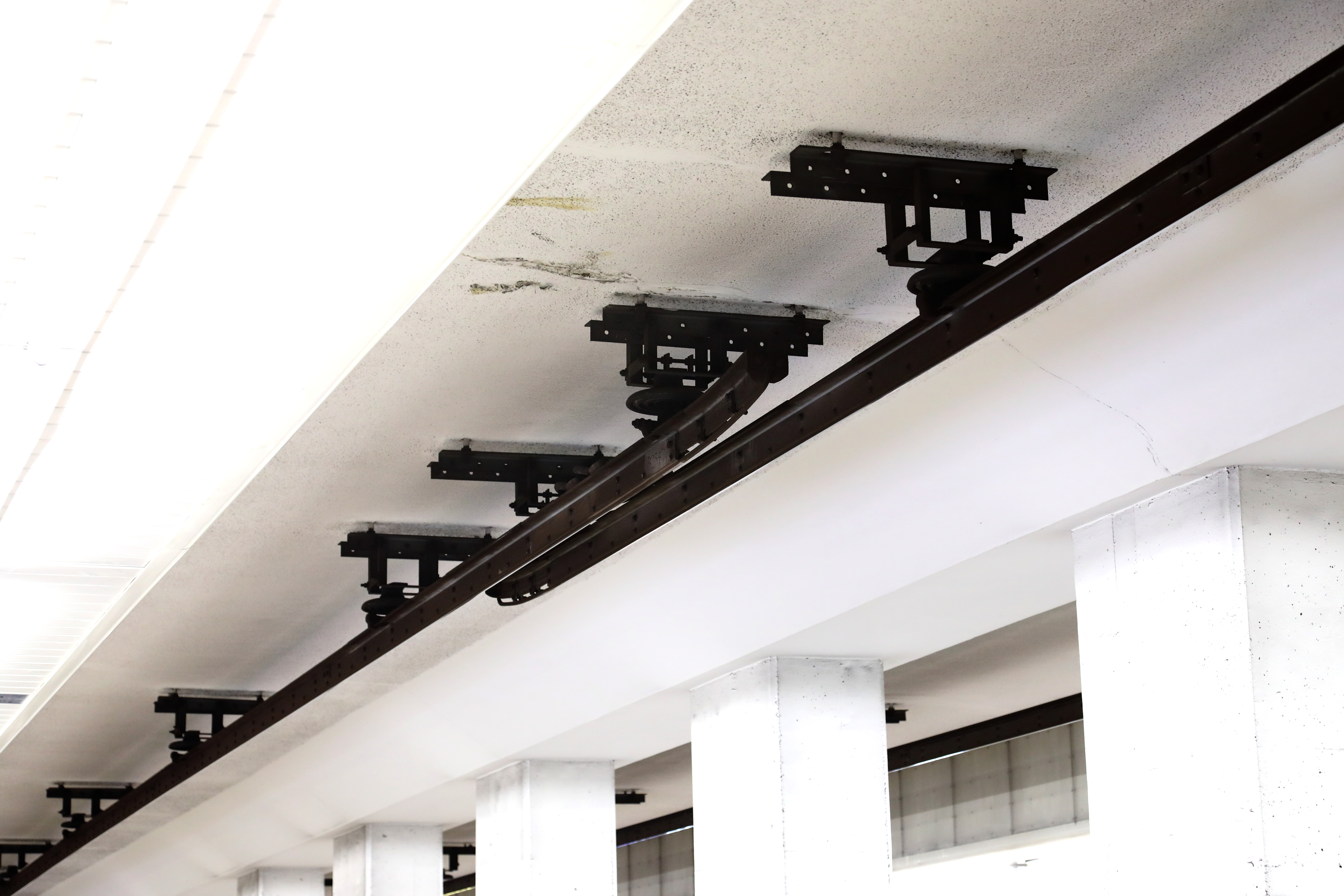 東京メトロ日比谷線秋葉原駅における剛体架線のエアセクション